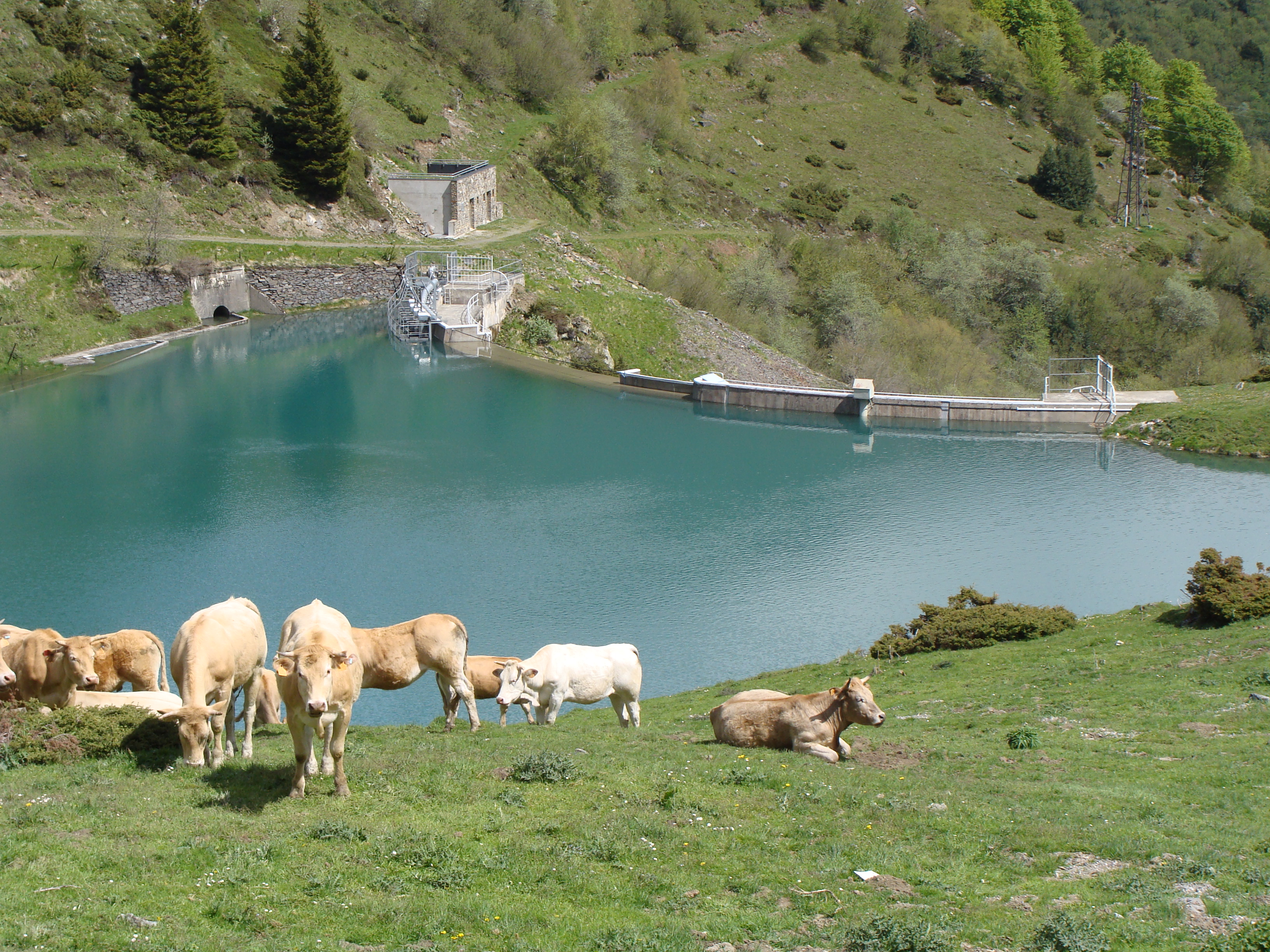 Reservoir du La Mongie — Barrage de Castillon, Hautes-Pyrénées.